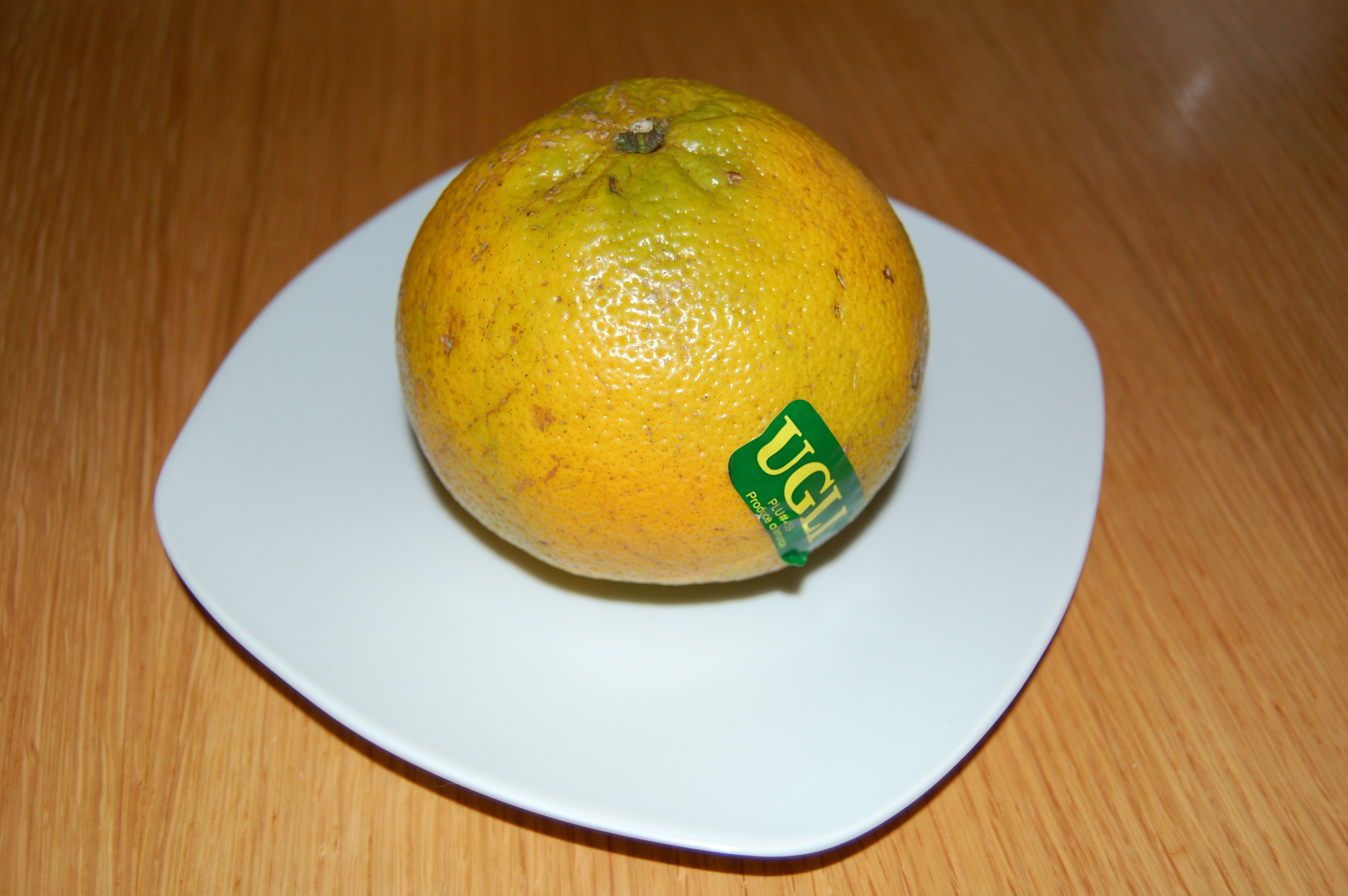 UGLI® fruit